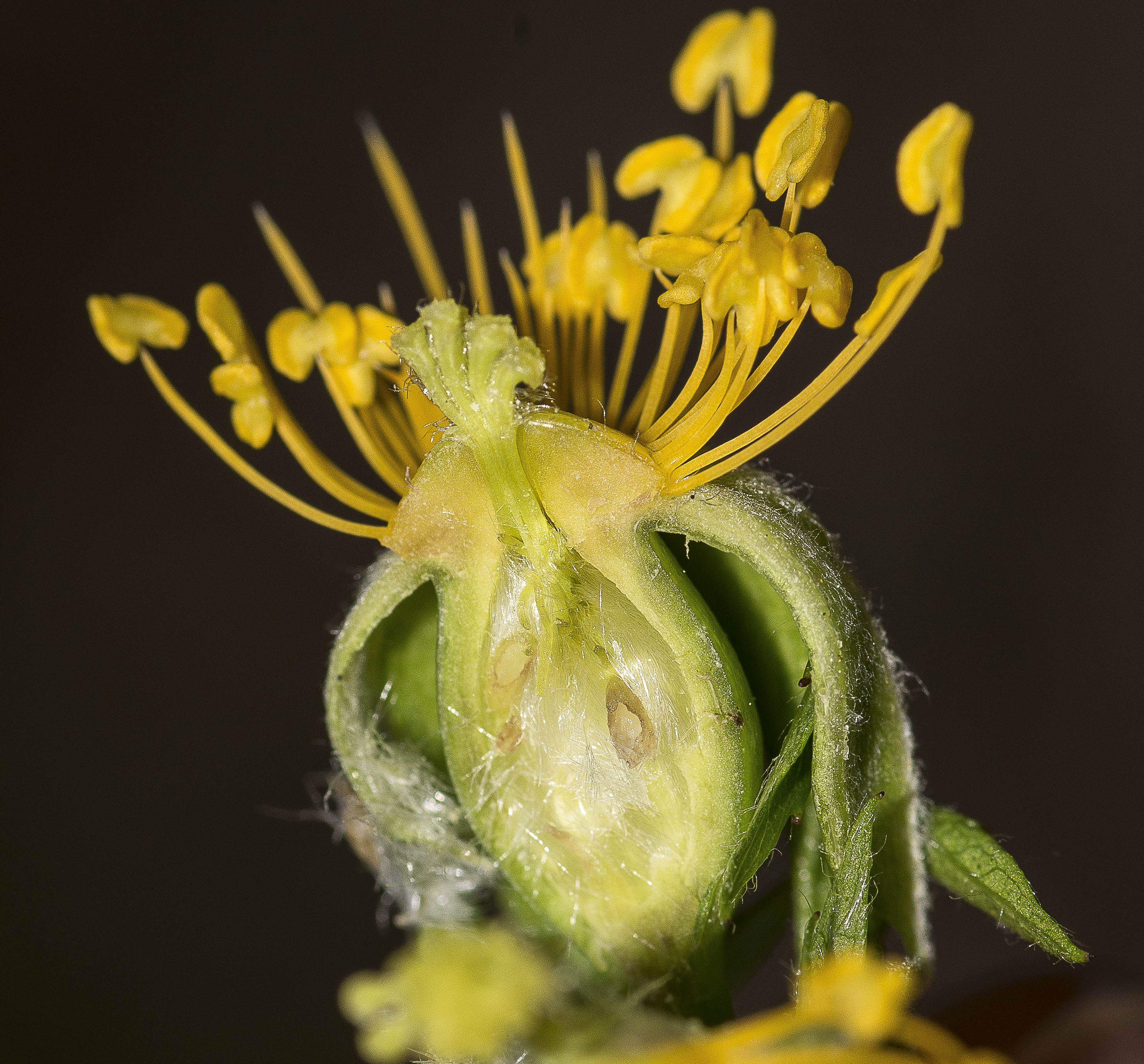 Rosa canina